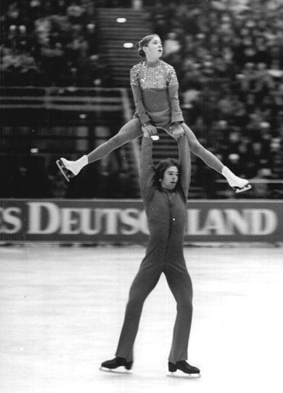 Eiskunstläufer, Paarlauf ADN-ZB Häßler 19.11.72 Dresden: DDR-Eiskunstläufer überzeugten beim Saisonstart. Im Paarlaufen sicherten sich bei ihrem ersten gemeinsamen Wettkampf Romy Kermer-Rolf Österreich (SC Karl-Marx-Stadt - SC Dynamo Berlin) einen guten zweiten Platz vor dem sowjetischen Paar Laonidowa-Bogoljubow. Den begehrten Pokal der blauen Schwerter im Paarlauf sicherten sich nach souveräner Leistung Groß-Kagelmann (SC Dynamo Berlin). (vergl. L 1119-14N)